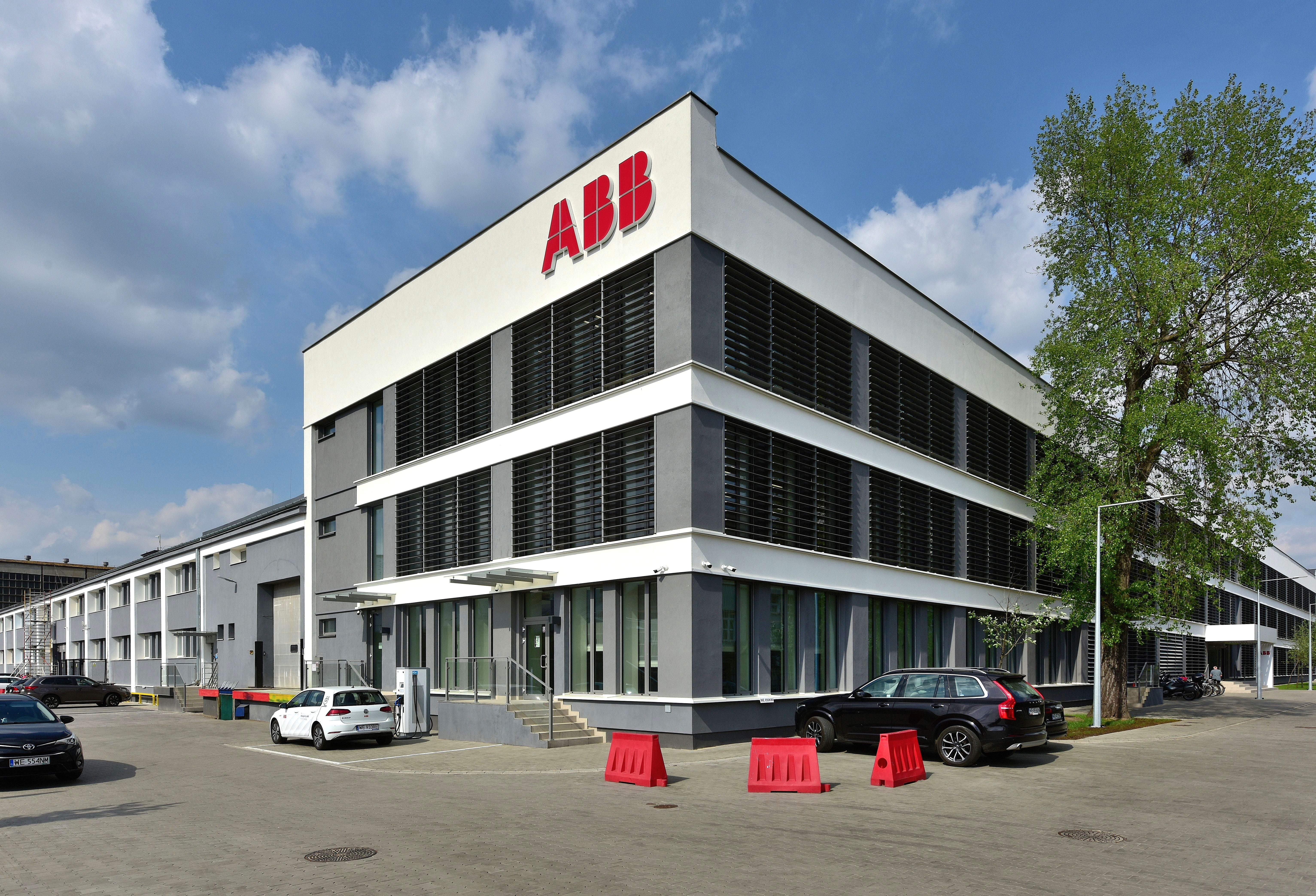 Siedziba spółki ABB przy ul. Żegańskiej 1 w Warszawie